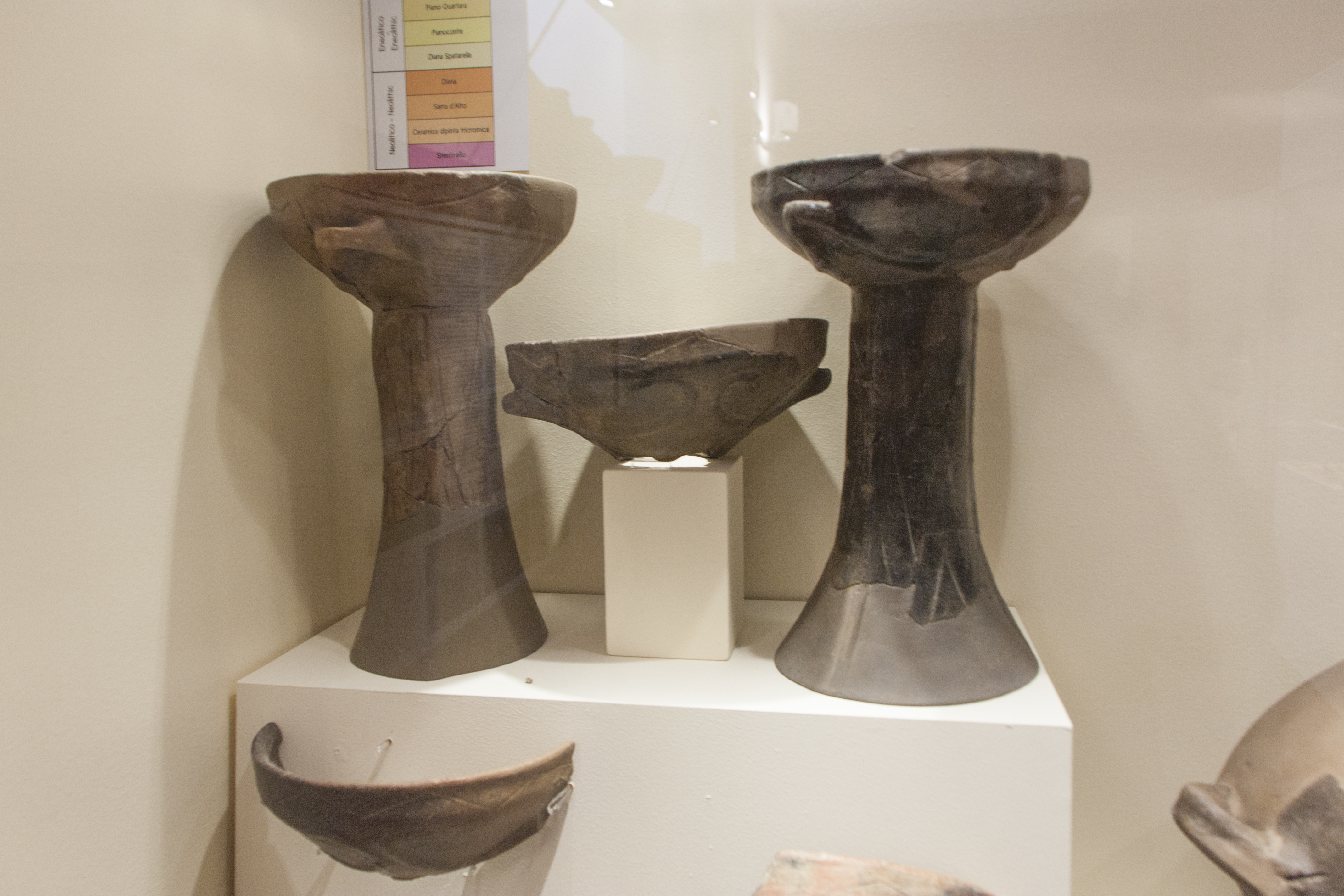 Età del bronzo medio 3 Cultura di Milazzese 1500-1300 a.C. Salina, Portella